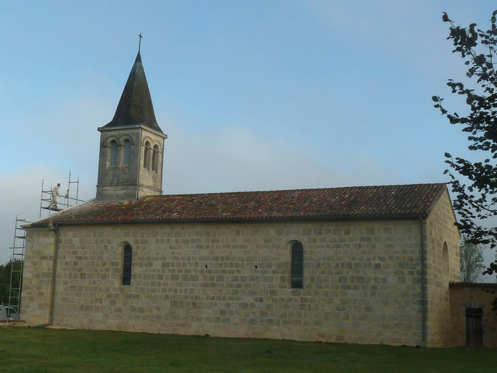 église de Boisbreteau (16), France